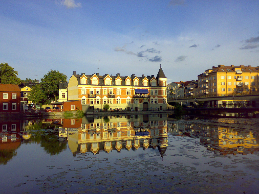 Eskilstuna.